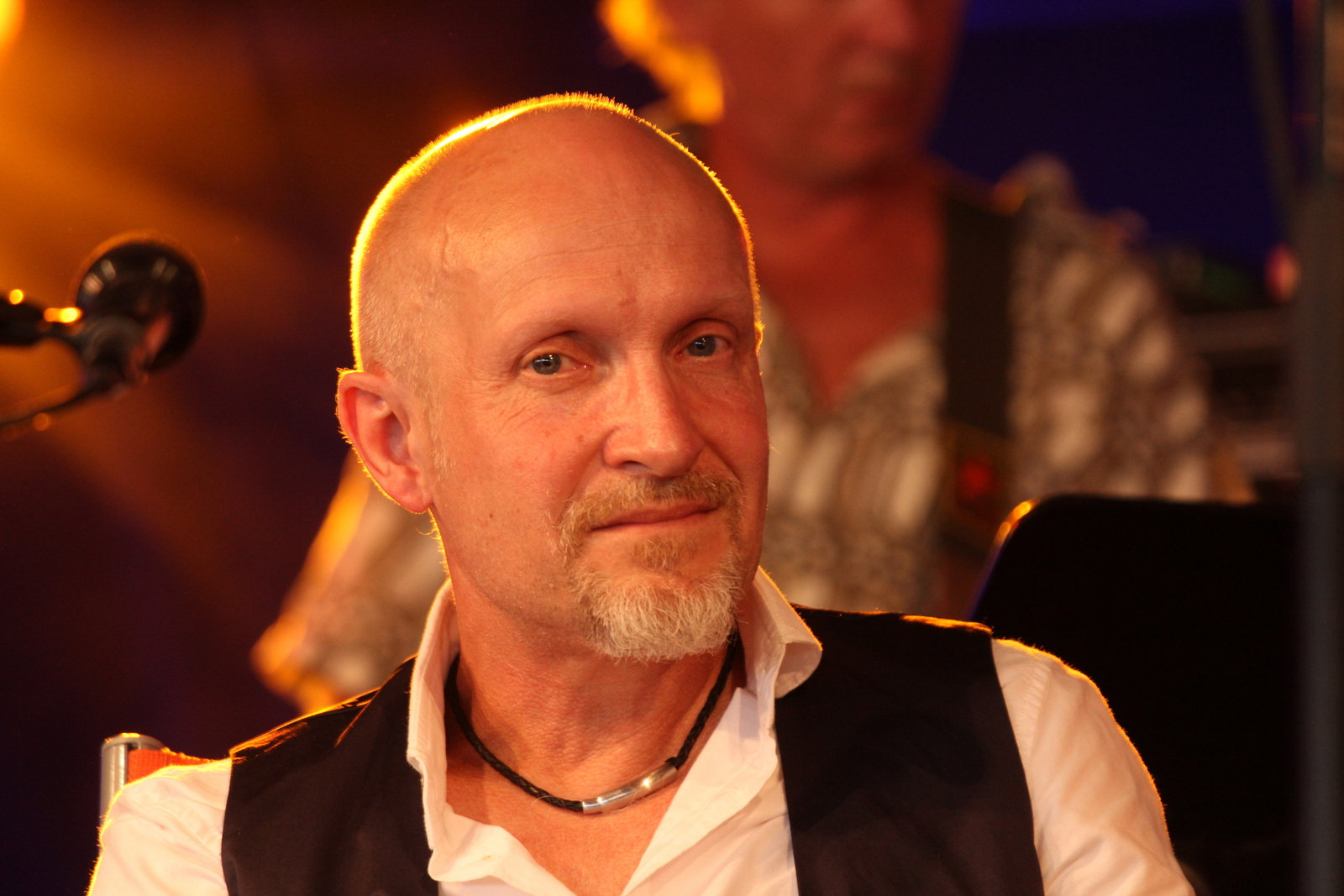 Lars Saabye Christensen_at Notodden Blues Festival